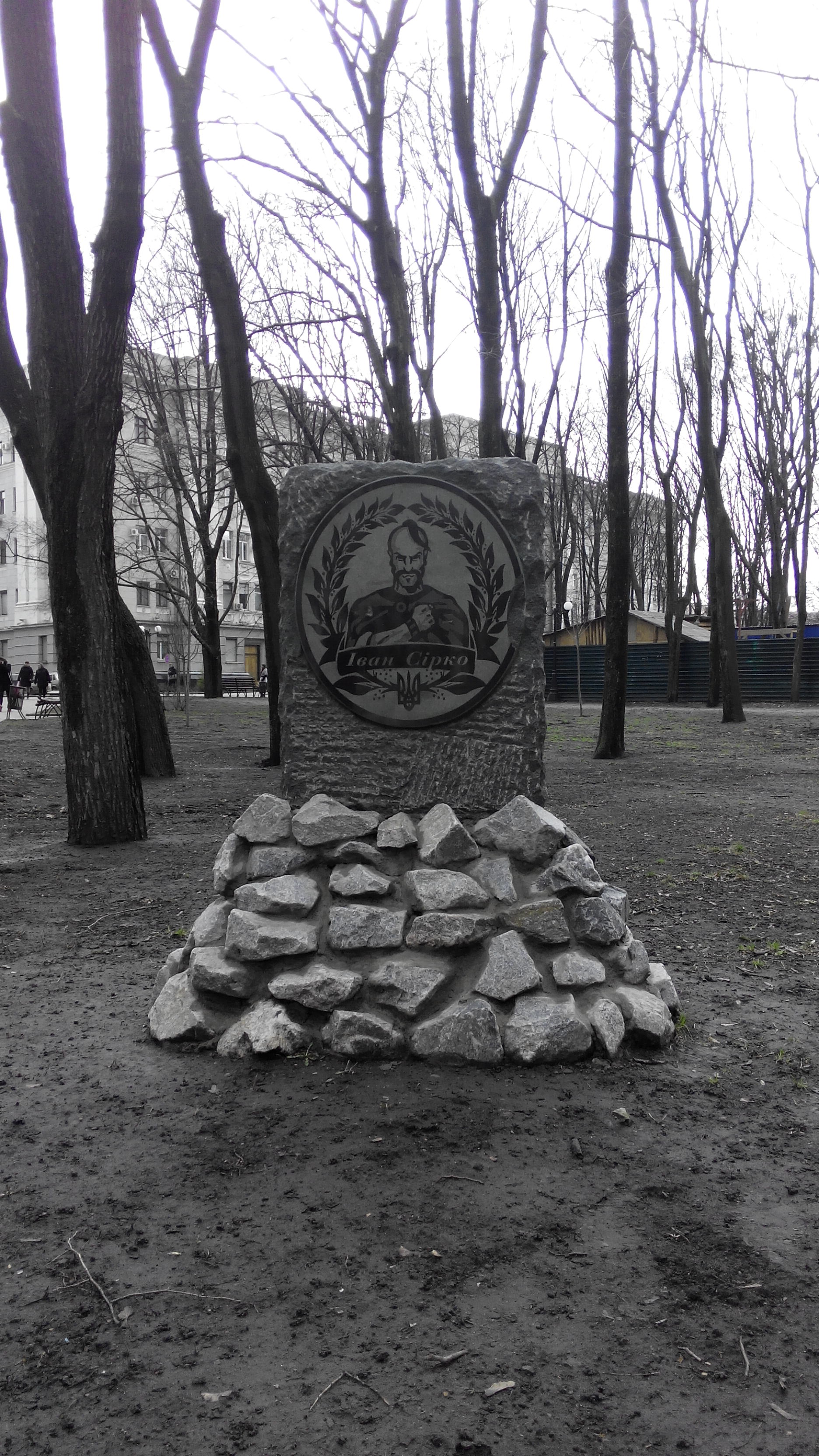 Пам'ятник Івану Сірко в місті Харкові. Встановлений 24 серпня 2014 року.